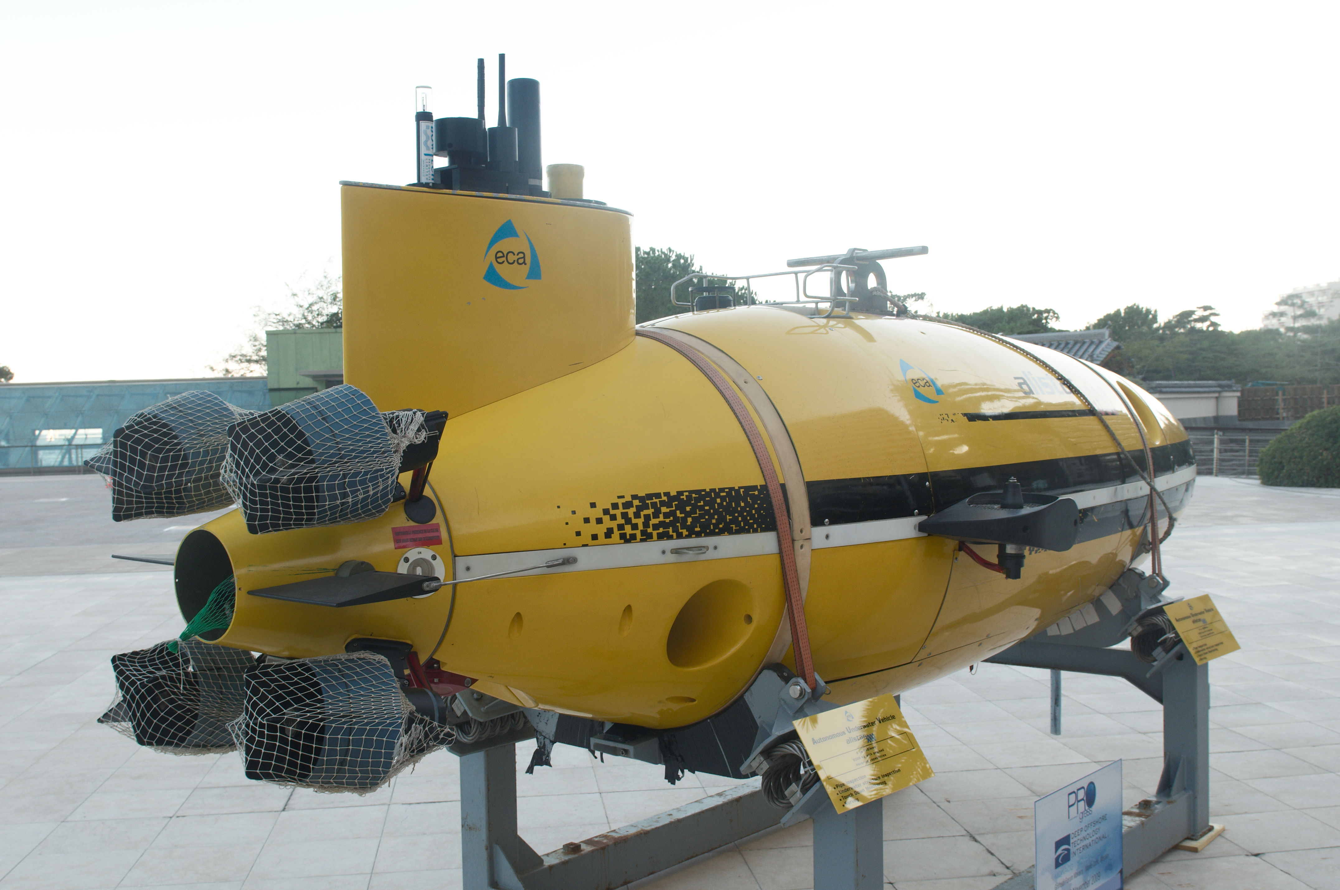 Autonomous Underwater Vehicule Alistar 3000 - Eca